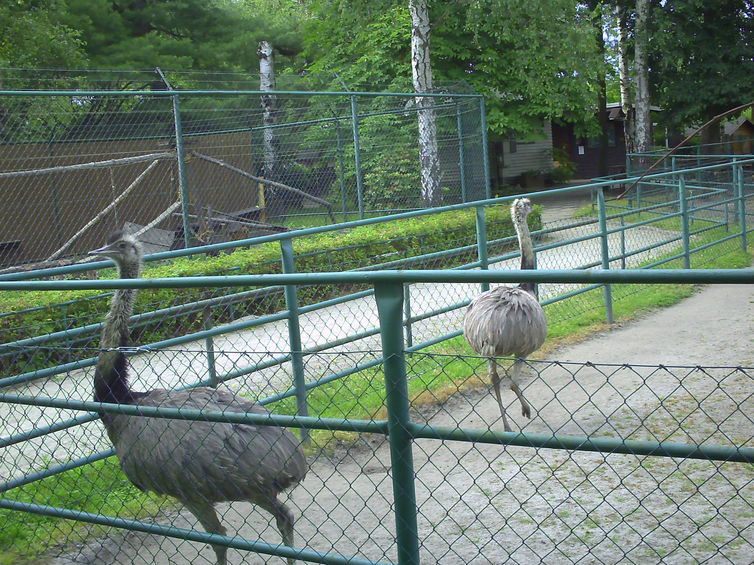 Zwei Nandus (Rhea americana) im Gehege des Tierparks in Weißwasser